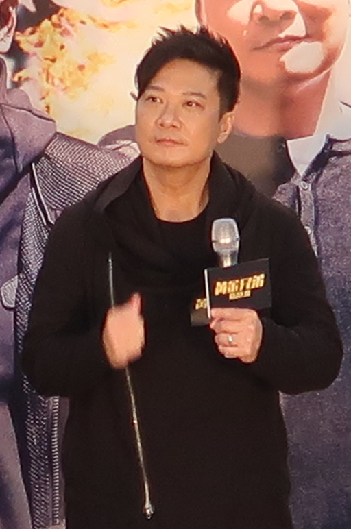 Chin Ka Lok